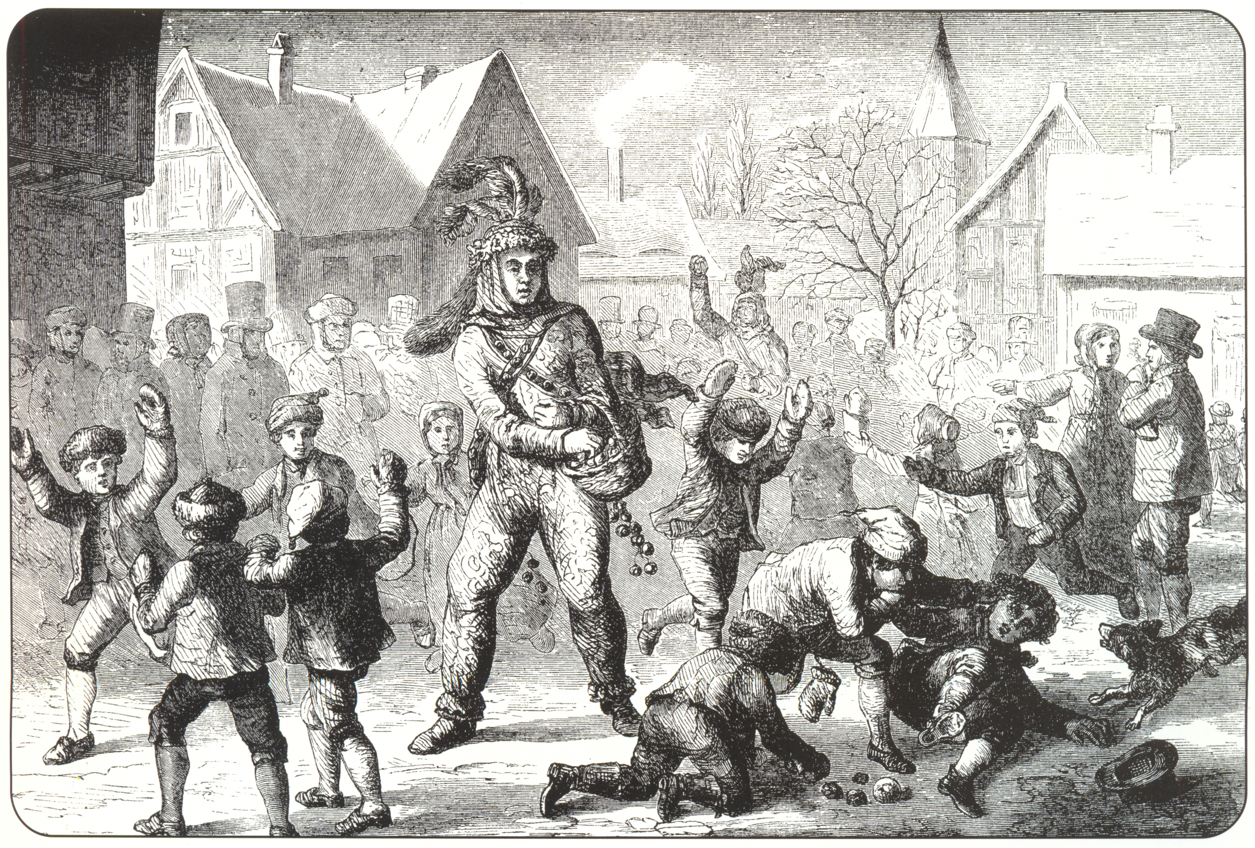 Das Hansellaufen in der Baar